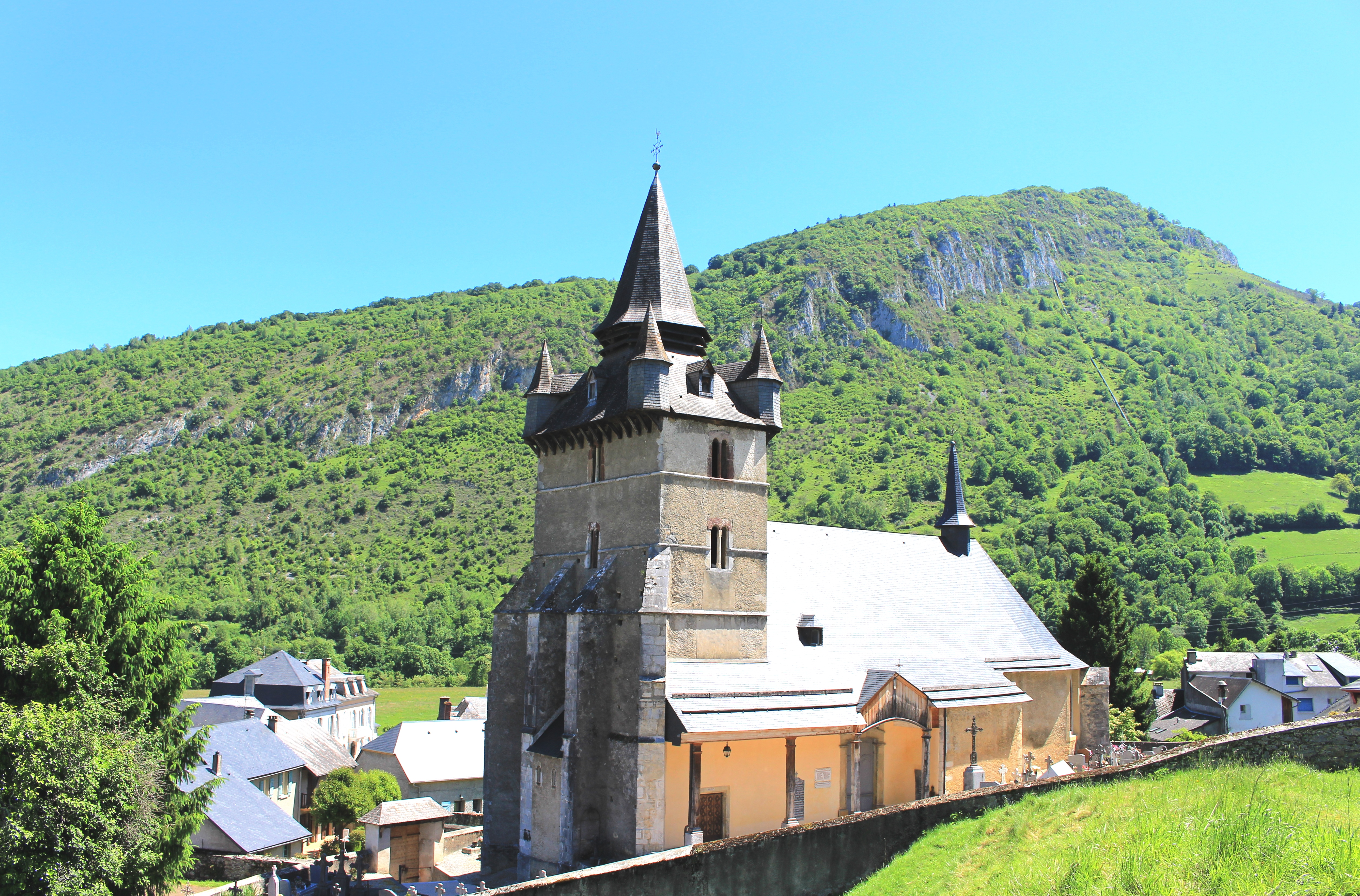 Église Saint-Martin de Beaudéan (Hautes-Pyrénées)